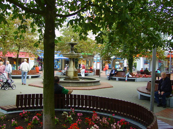 Brunnenplatz im Einkaufszentrum Märkisches Zentrum in Berlin-Märkisches Viertel